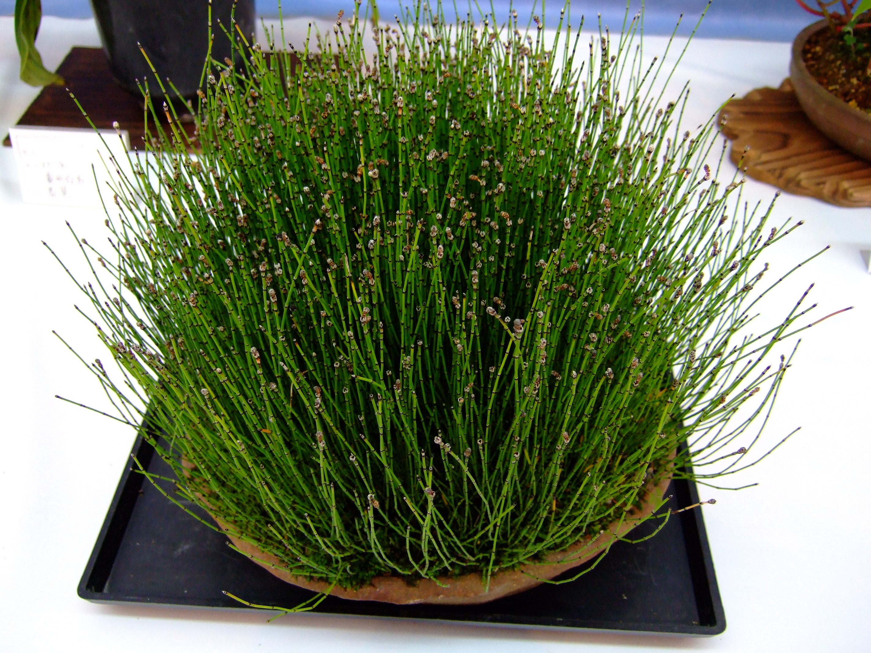 兵庫県立フラワーセンター ヒメトクサ